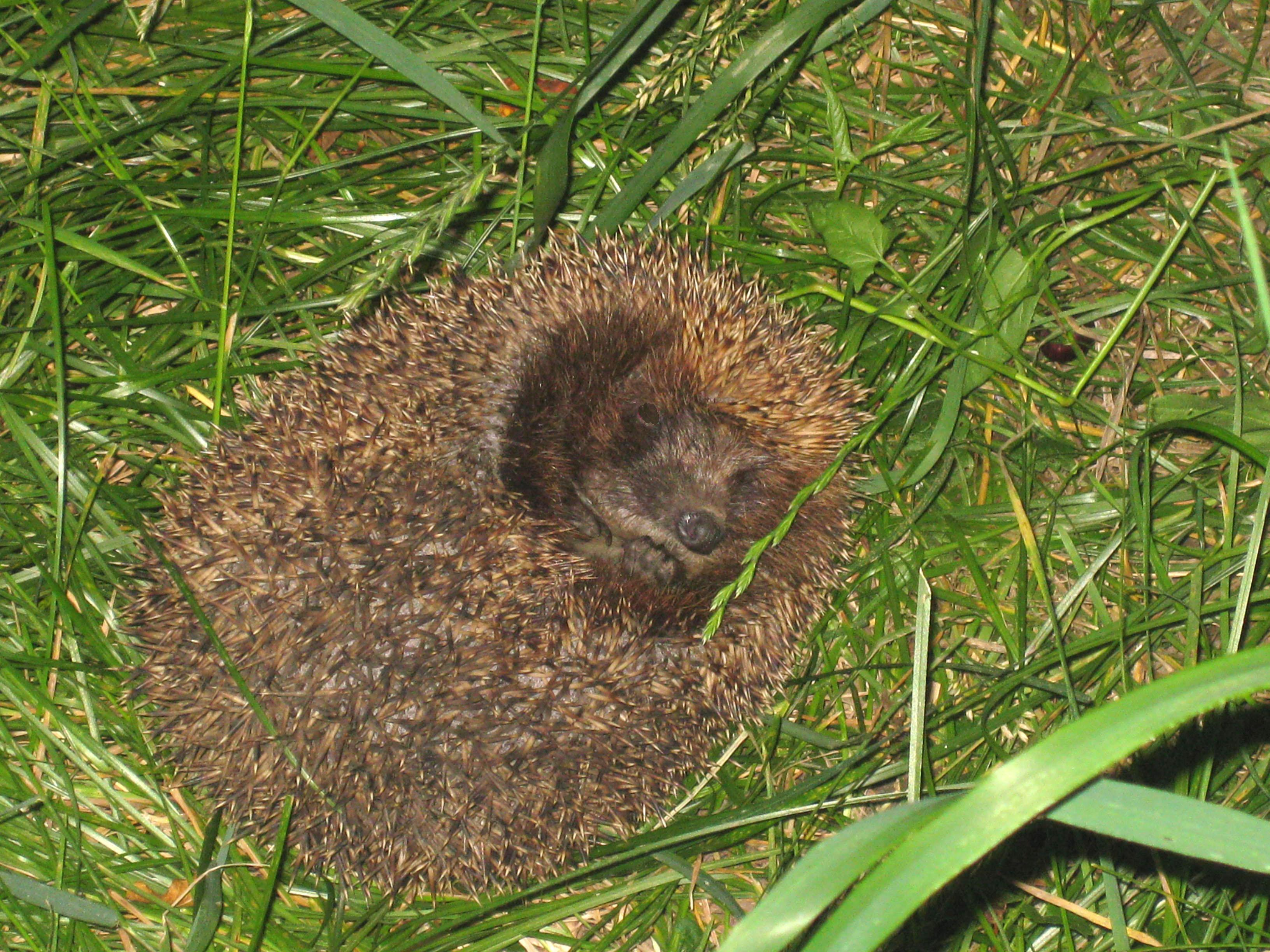 Ёж, свернувшийся в клубок.